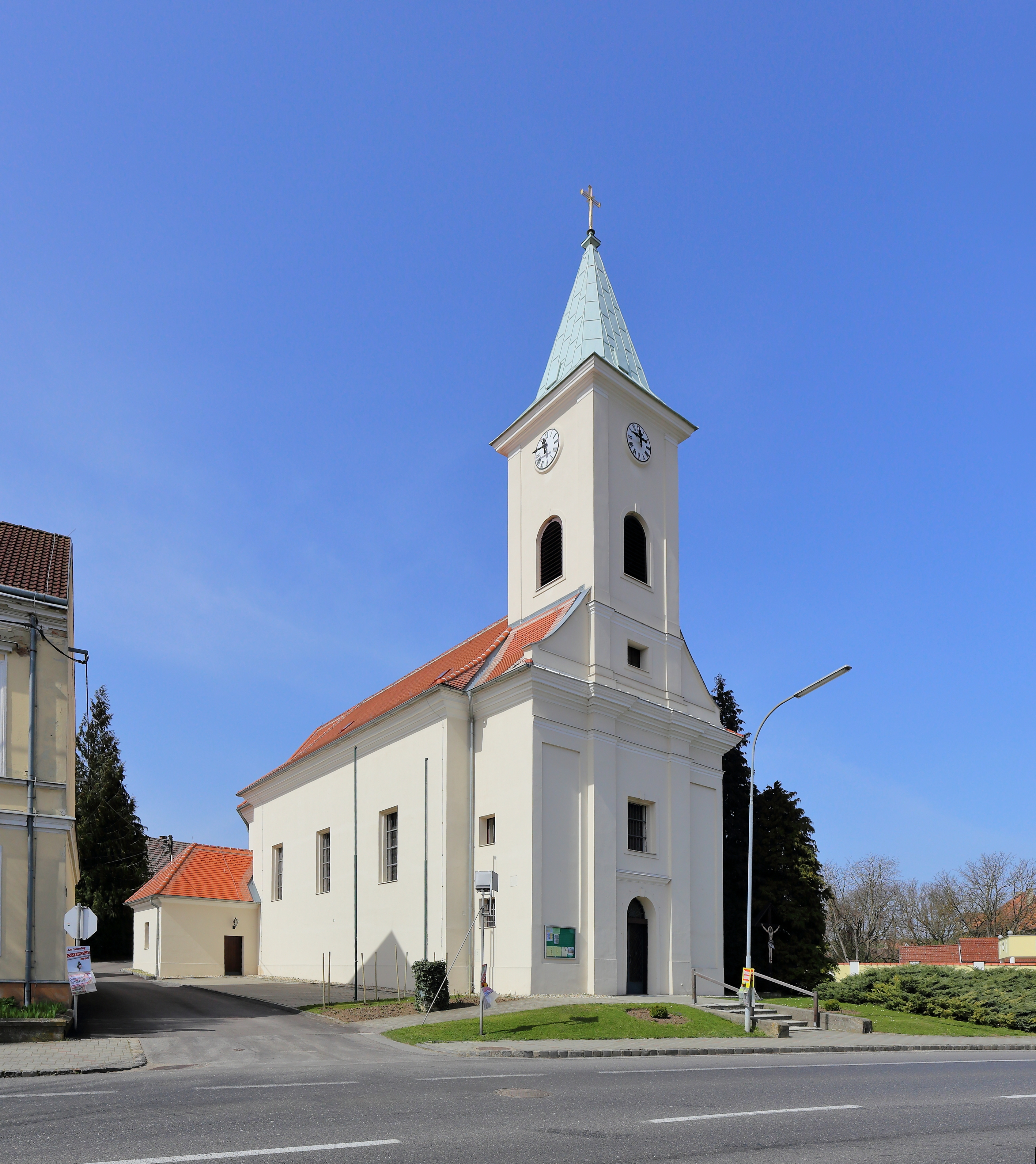 Südostansicht der römisch-katholischen Pfarrkirche hll. Petrus und Paulus in Erdberg, ein Ortsteil der niederösterreichischen Stadt Poysdorf. Die frühklassizistische Saalkirche mit Fassadenturm und eingezogenem Westchor wurde 1787 errichtet.